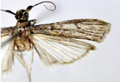 Merulempista cyclogramma